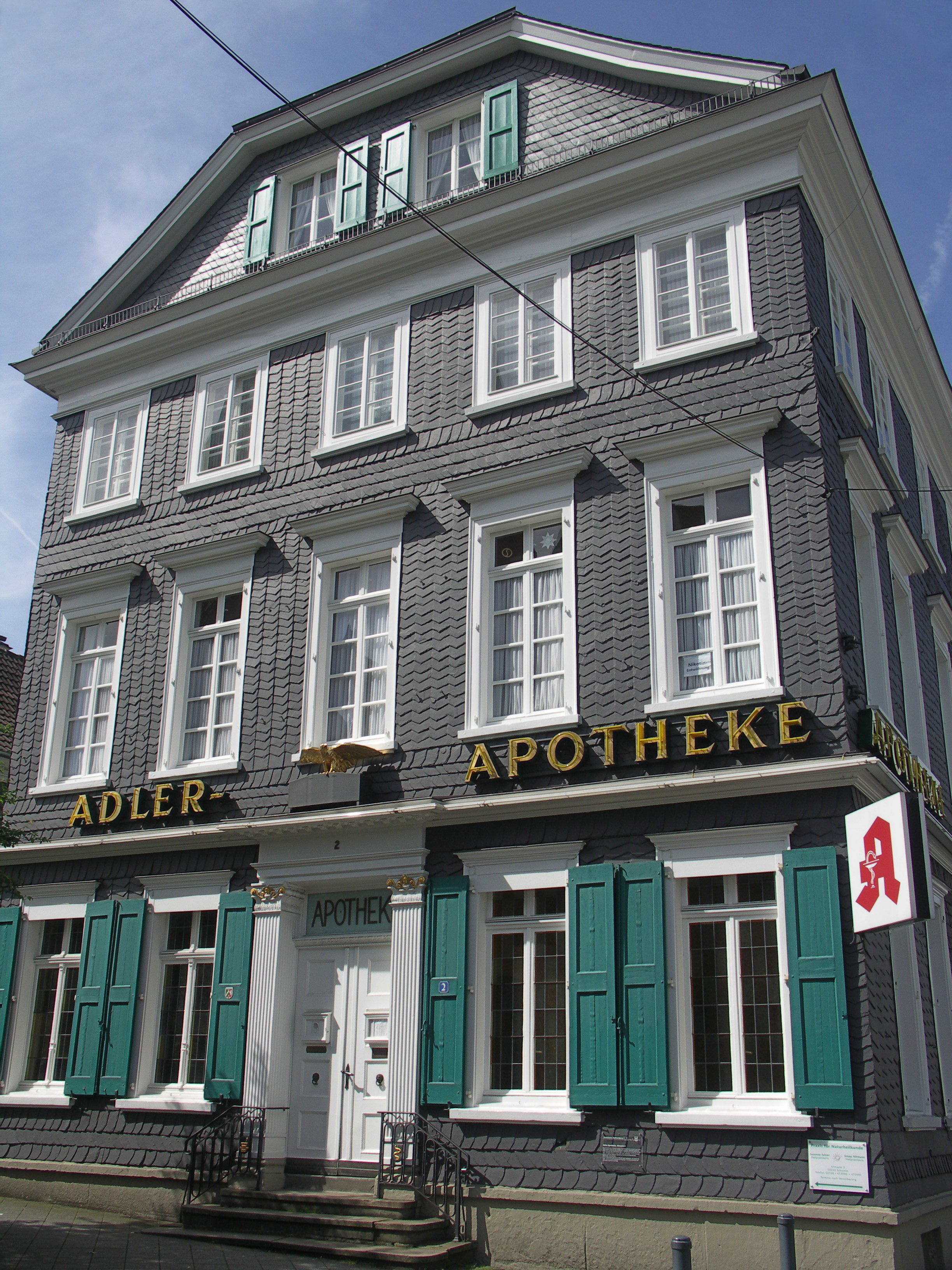 denkmalgeschütztes Haus Nr. 2 am Altmarkt in Schwelm, NRW, Deutschland